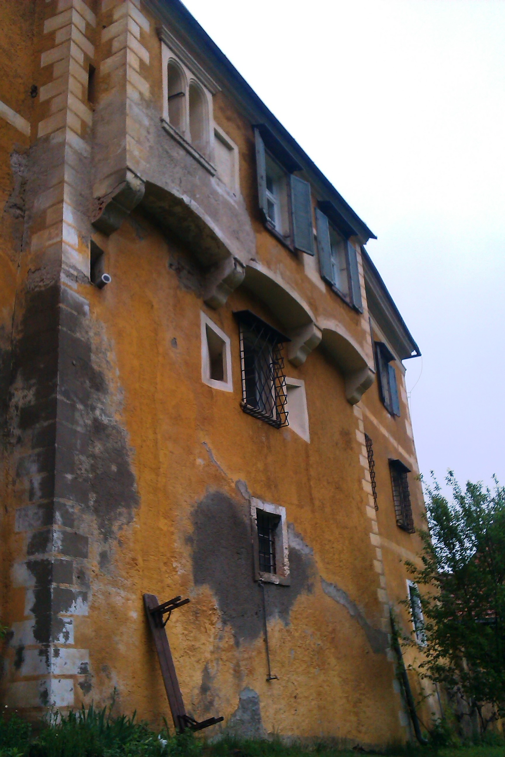 Schloss Limberg bei Wies, Außenmauer